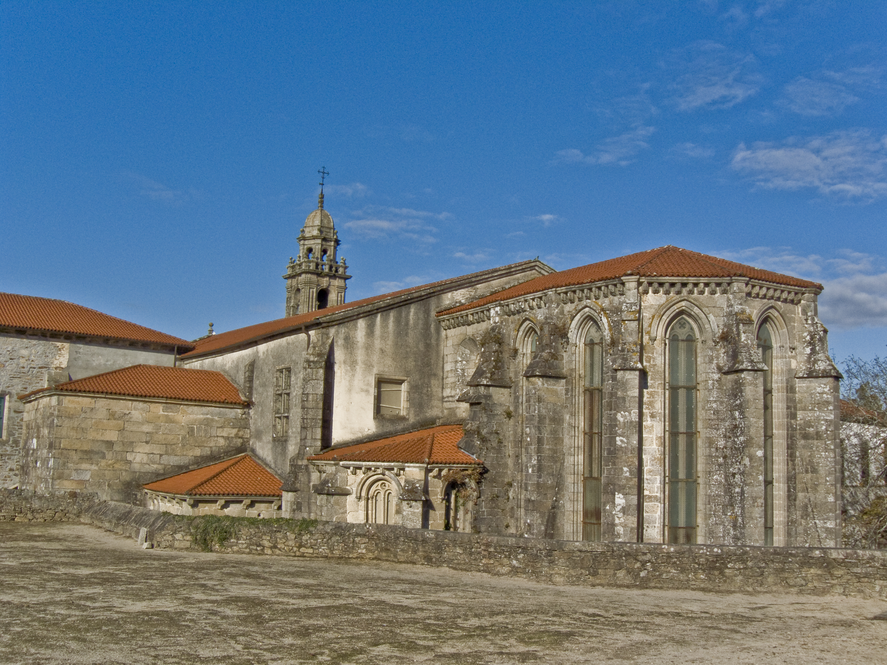 Ábsidas da Igrexa do Convento de San Domingos de Bonaval